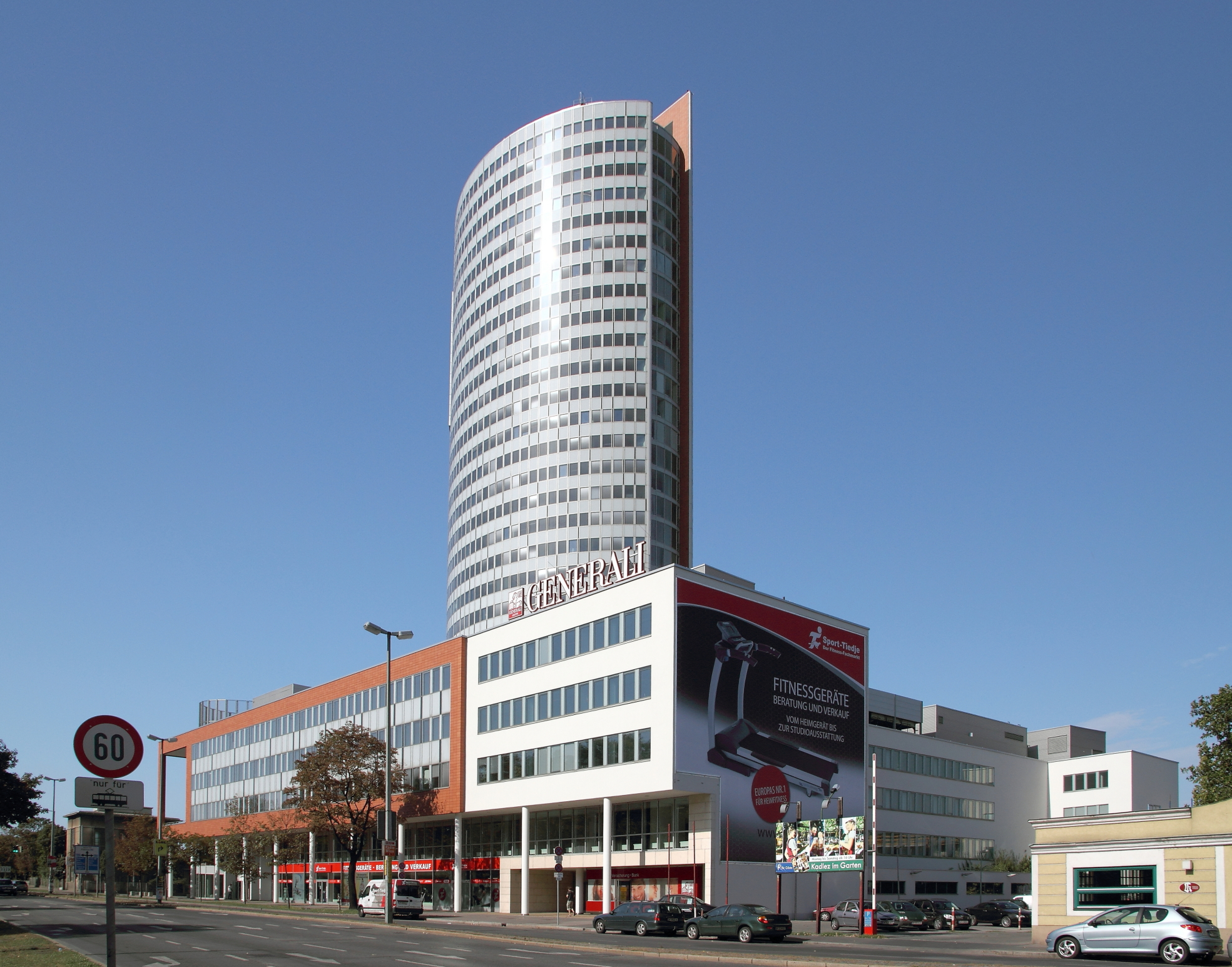 Der Florido Tower im 21. Wiener Gemeindebezirk Floridsdorf.Das Bürohochhaus wurde von 1999 bis 2001 nach Entwürfen der Architekten Andreas und Herbert Müller-Hartburg errichtet. Das Gebäude zählt mit einer Höhe von 113 Metern zu den höchsten Bauwerken Wiens. Es verfügt über eine Nutzfläche von rund 36.000 m², die sich auf 31 Geschosse verteilen.